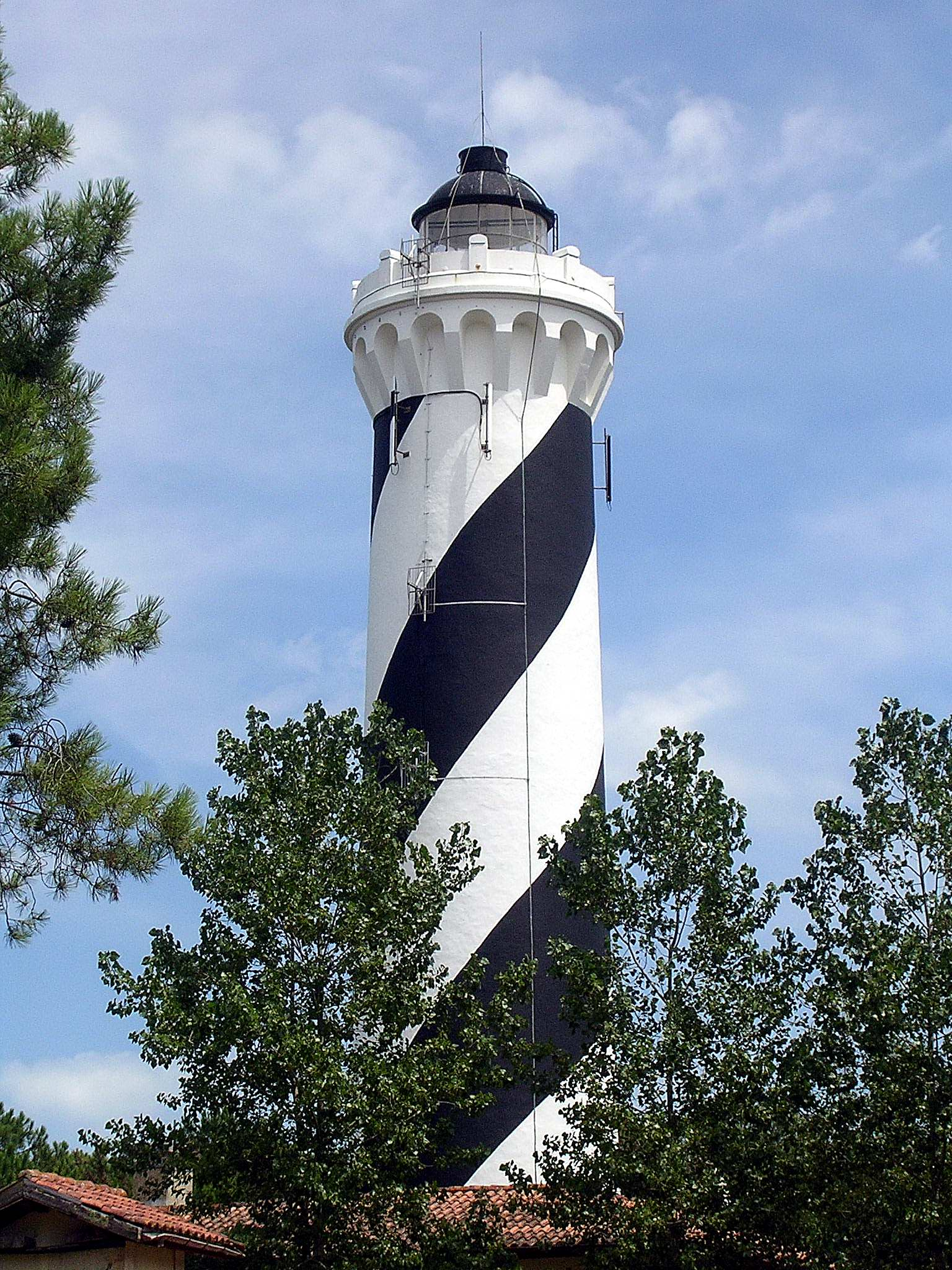 Phare de Contis, dans le département français des Landes